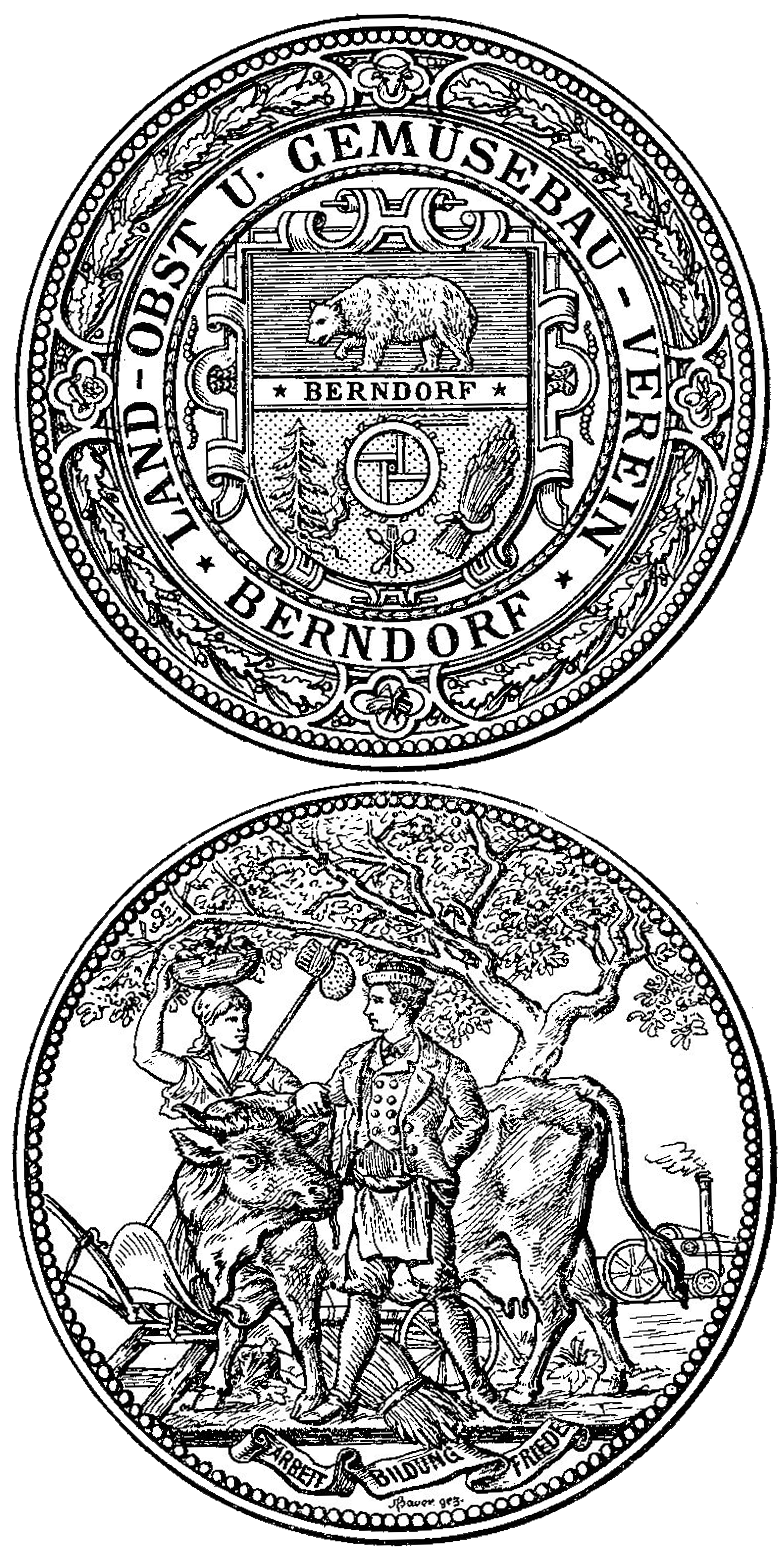 Medaille für den landwirtschaftlichen Verein Berndorf; Stifter: Arthur Krupp